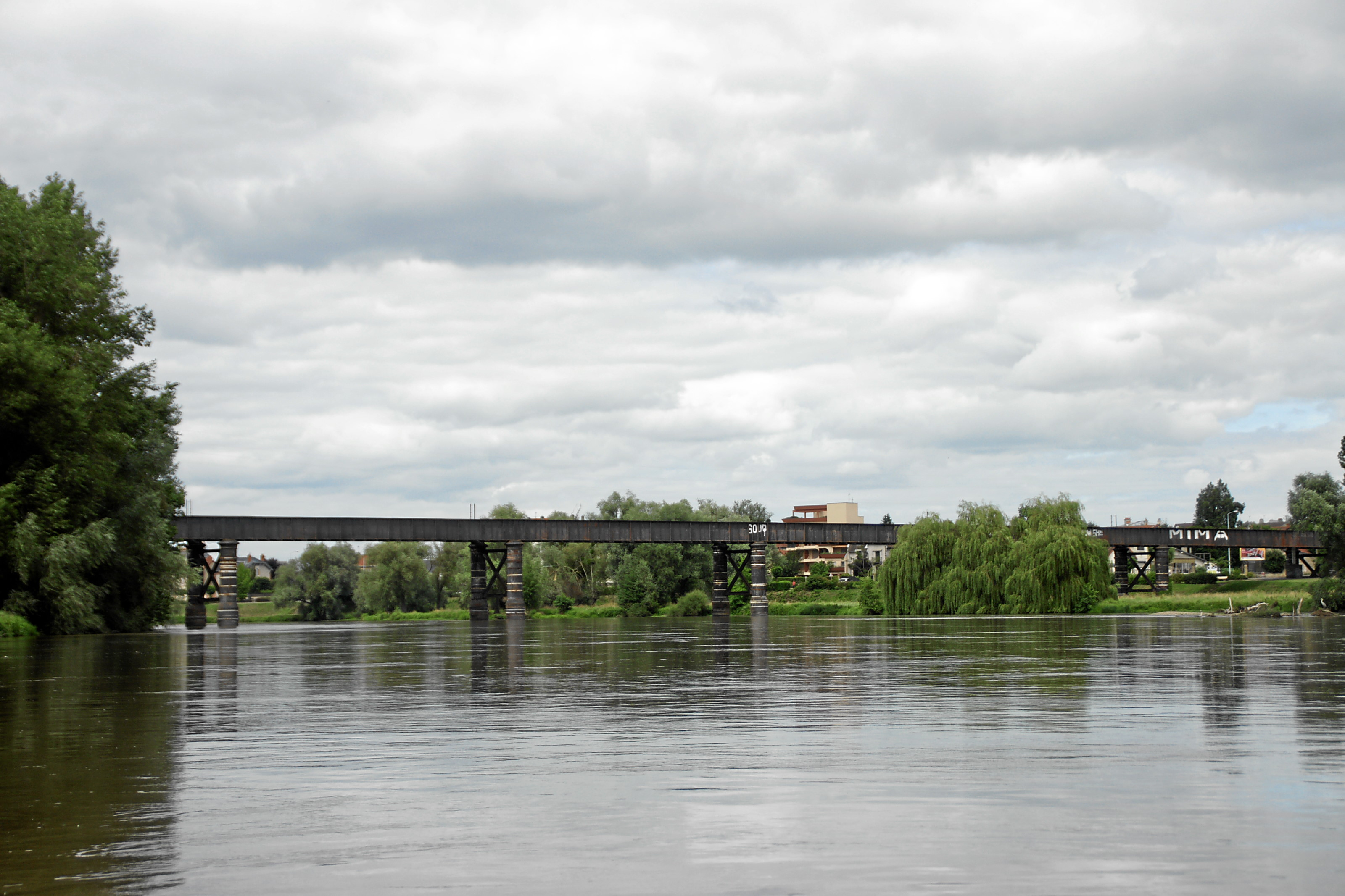 Eisenbahnbrücke über den Allier vor Moulins